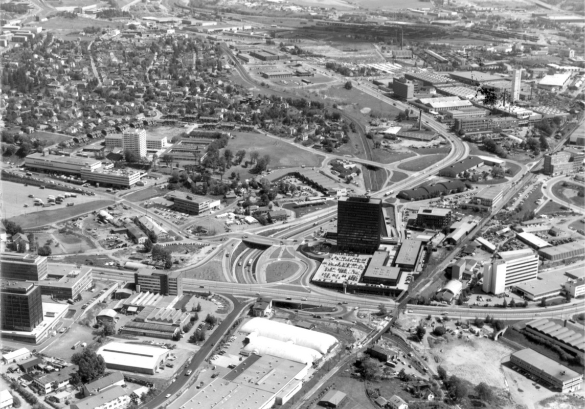 Økern 1972. Risløkka bak til venstre.